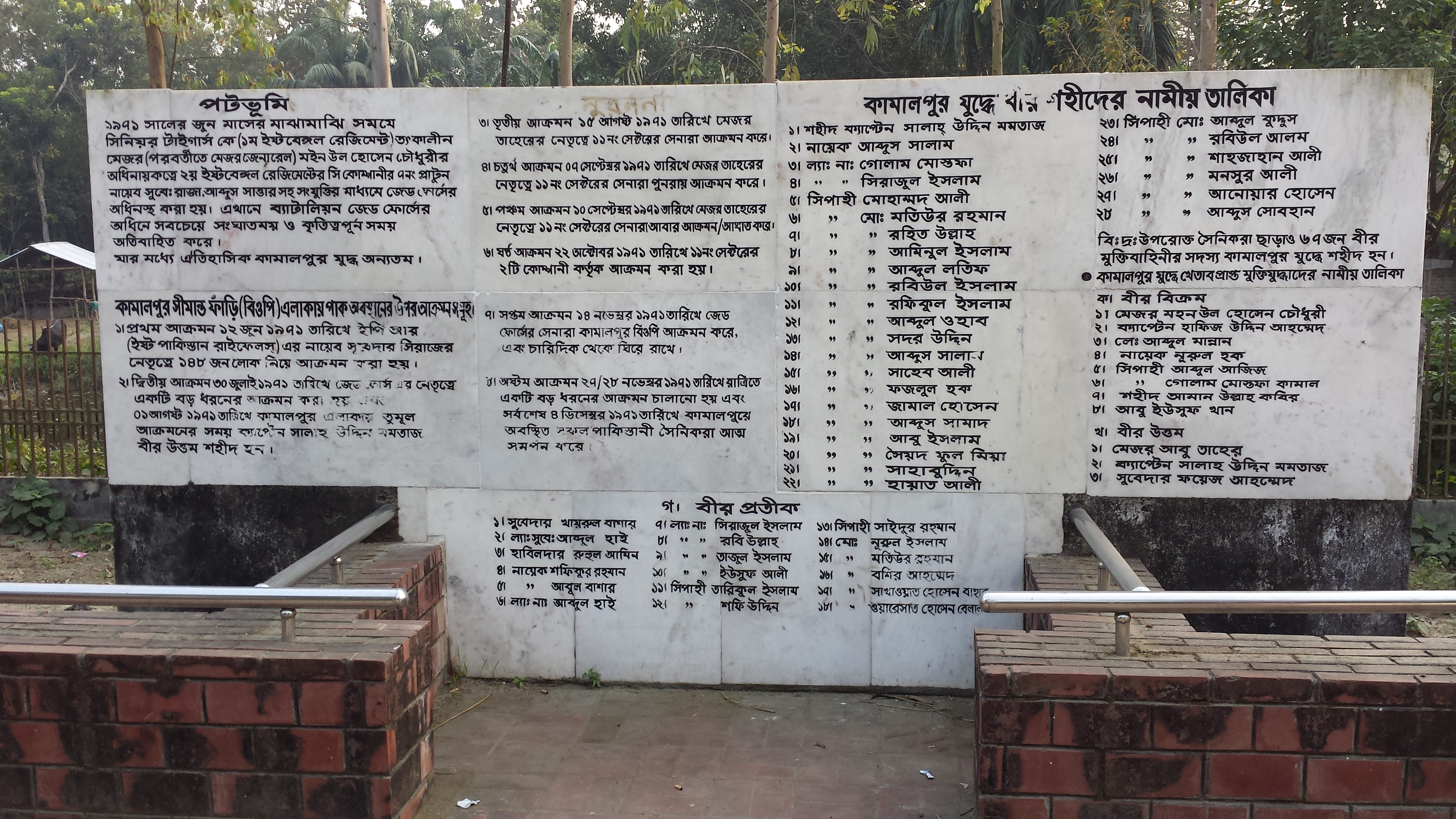 বাংলাদেশের মুক্তিযুদ্ধে জামালপুরের বকশীগঞ্জ উপজেলার ধানুয়া কামালপুরের যুদ্ধে শহীদ ও খেতাবপ্রাপ্ত মুক্তিযোদ্ধাদের নামাঙ্কিত স্মৃতিসৌধ